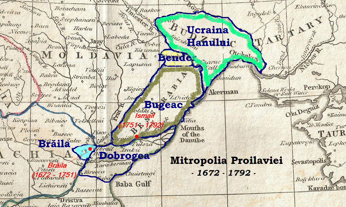 Harta arată teritoriile aflate sub jurisdicţia Mitropoliei Proilaviei, între anii 1672 - 1792